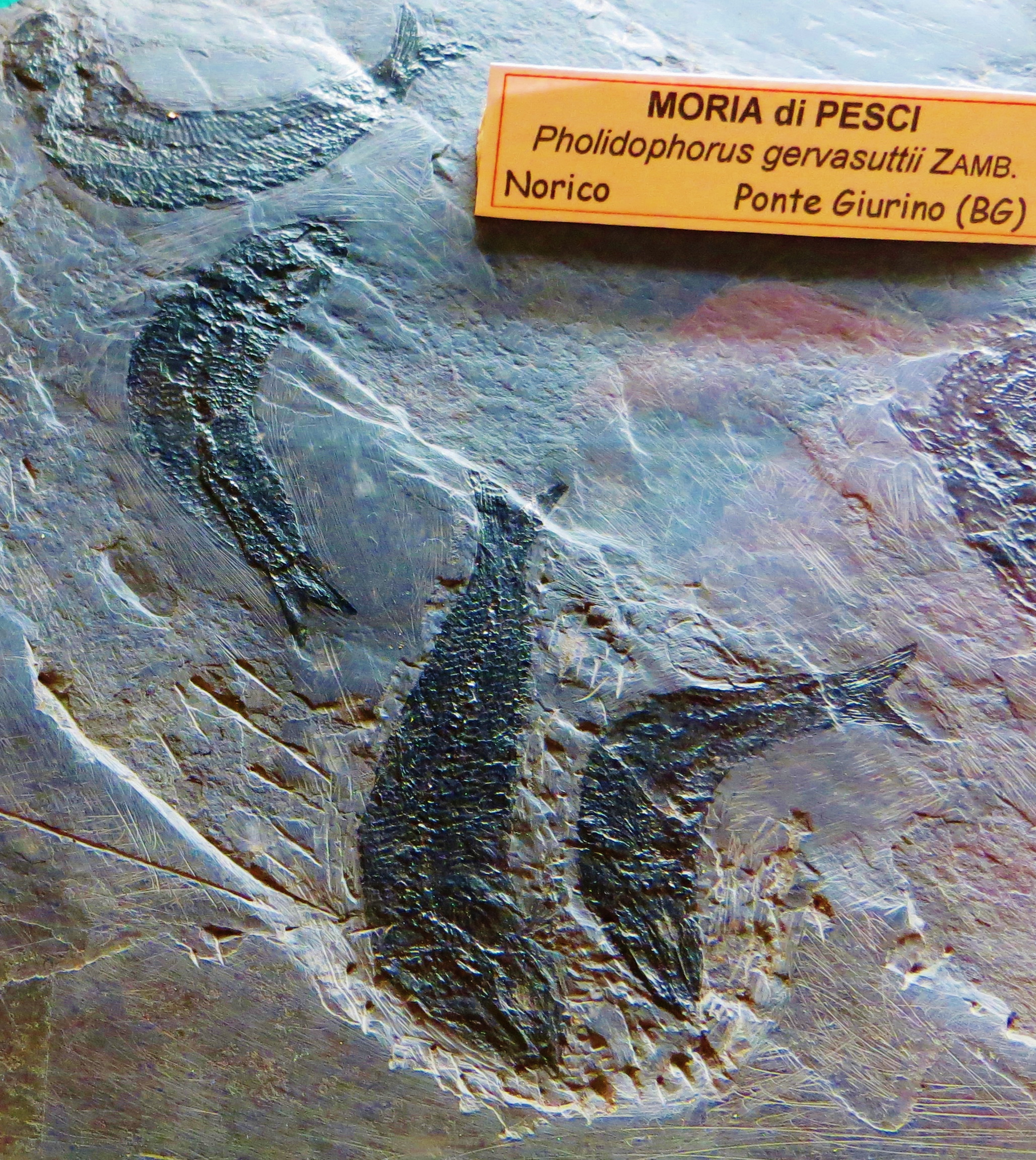 Fossil of Pholidophorus, an extinct fish- Took the picture at Museo di Storia naturale “Antonio Stoppani” - Venegono Inferiore